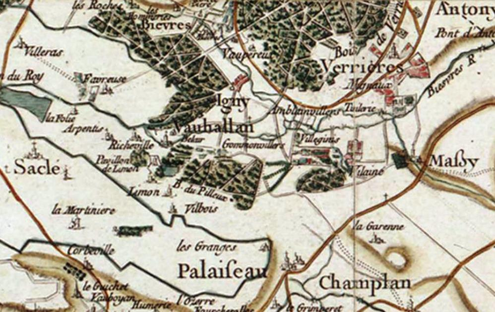 Carte de la région d'Igny (91) au XVIIe siècle par Cassini